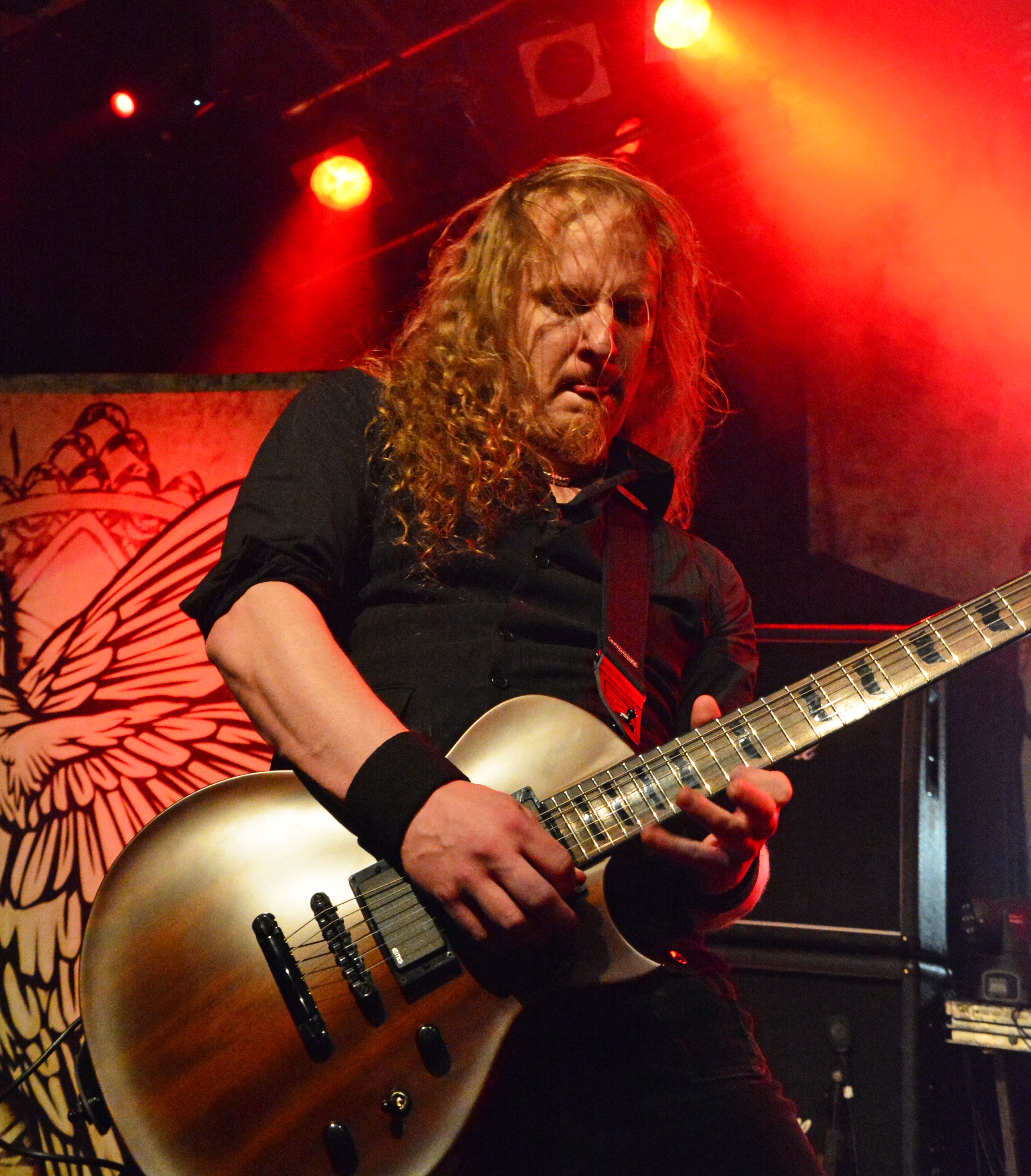 Gitarrist Christof Leim von The New Black bei den Hamburg Metal Dayz 2013